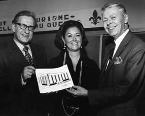 M. Paul-Émile Lévesque, directeur fondateur de l’Institut de tourisme et d'hôtellerie du Québec (ITHQ), Mme Claire Kirkland-Casgrain, ministre du Tourisme, de la Chasse et de la Pêche et M. Robert Prévost, sous-ministre MTCP.